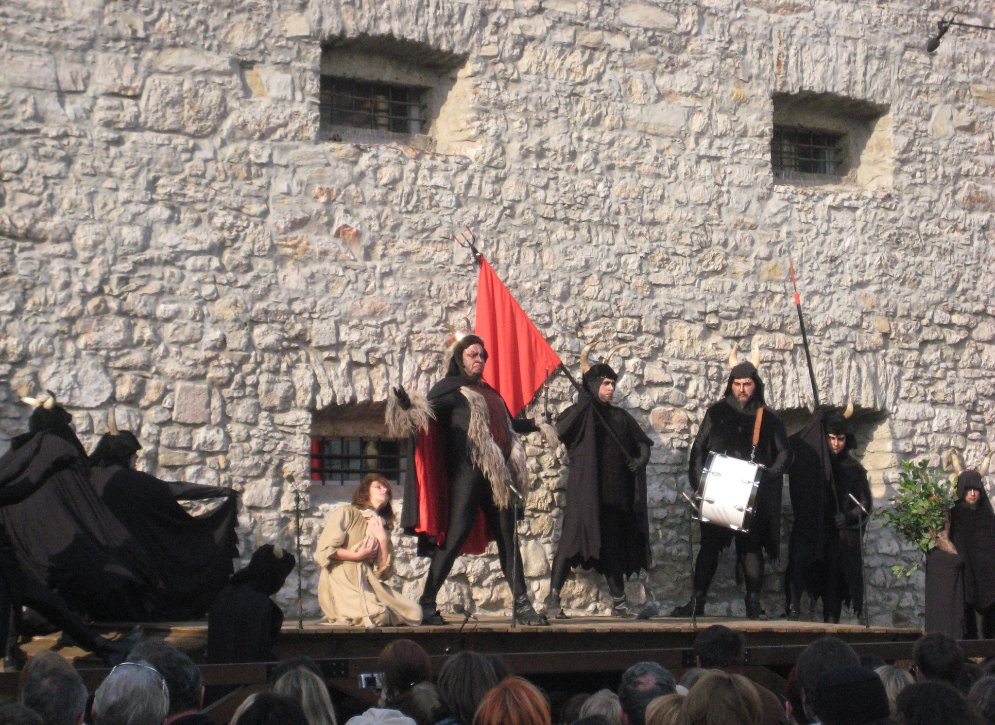 Škofjeloški pasijon (Processio Locopolitana), izvedba 2009 v Škofji Loki